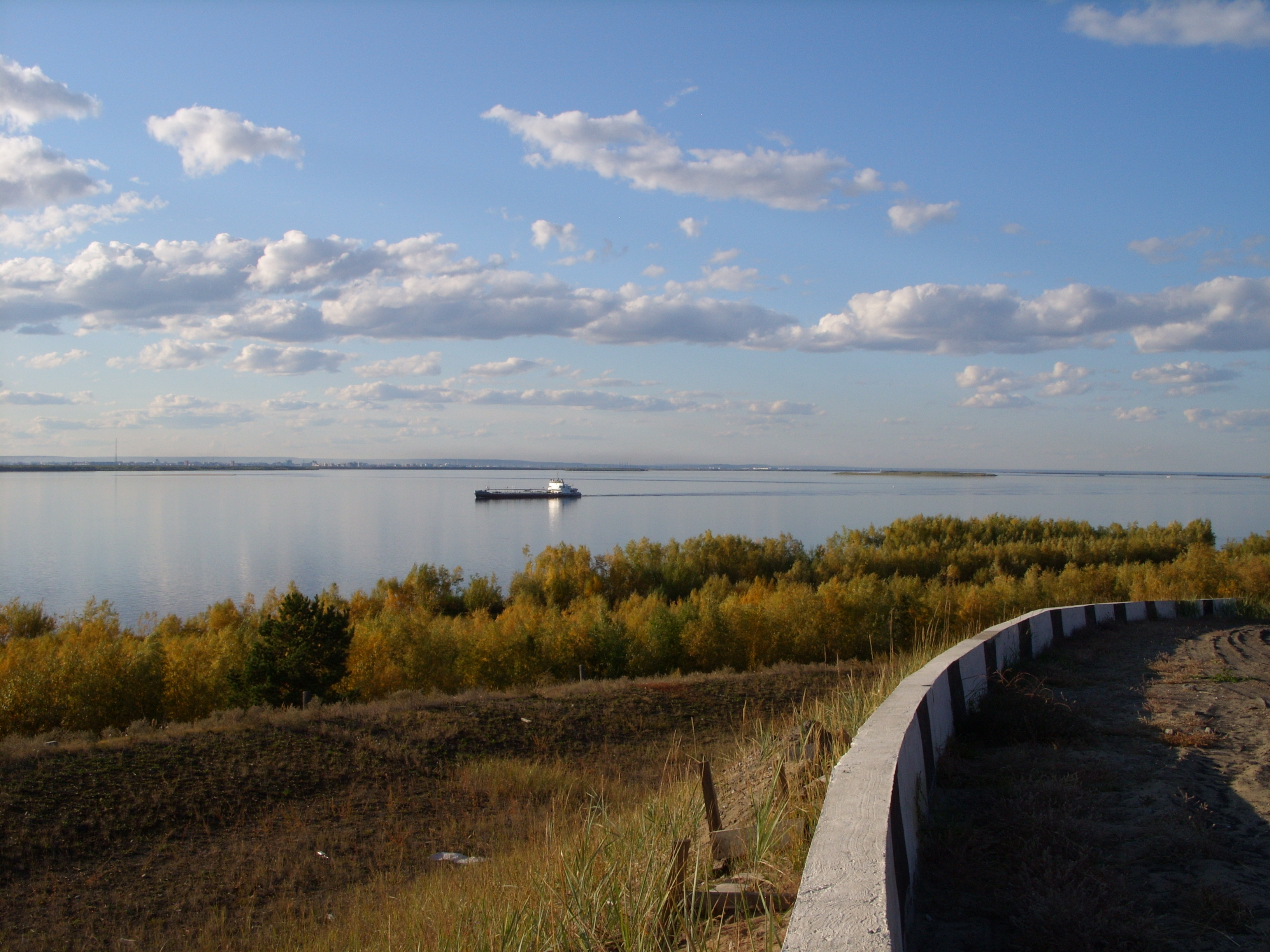 Снимок начала сентября 2009 г.